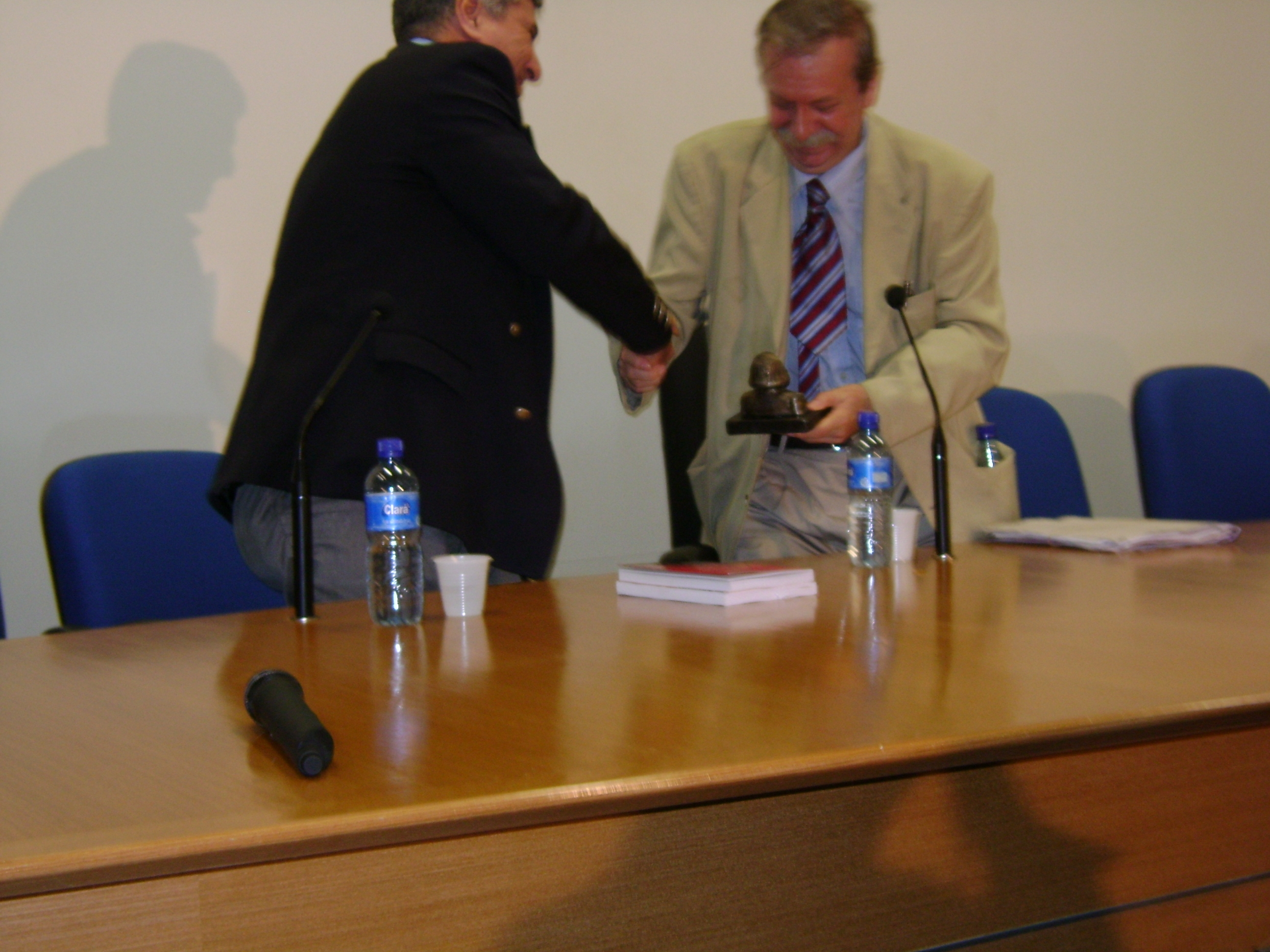 Arno Munster - Conférence à Fortaleza - Brésil en février 2008